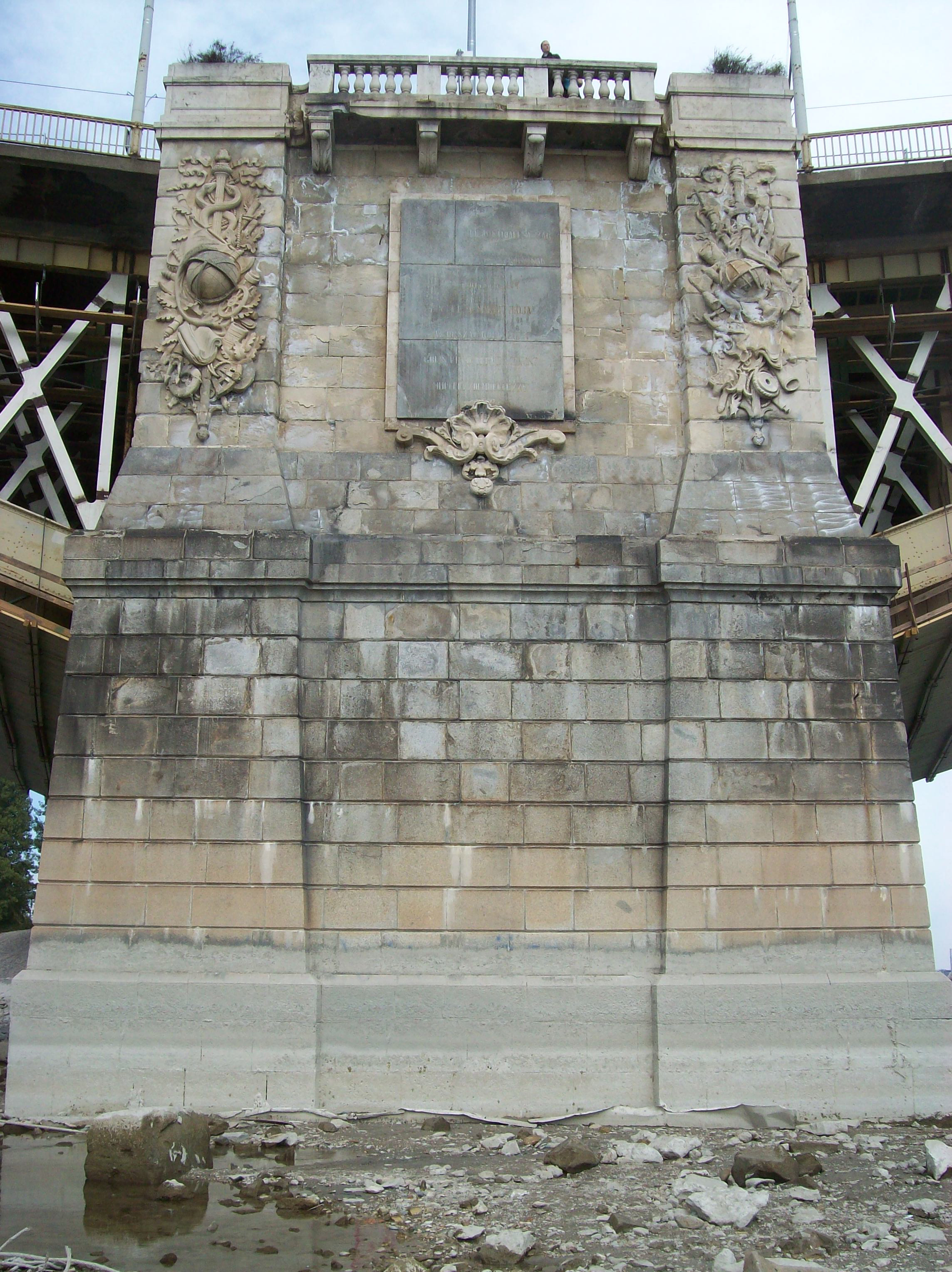 A Margit híd középső pillére elölről